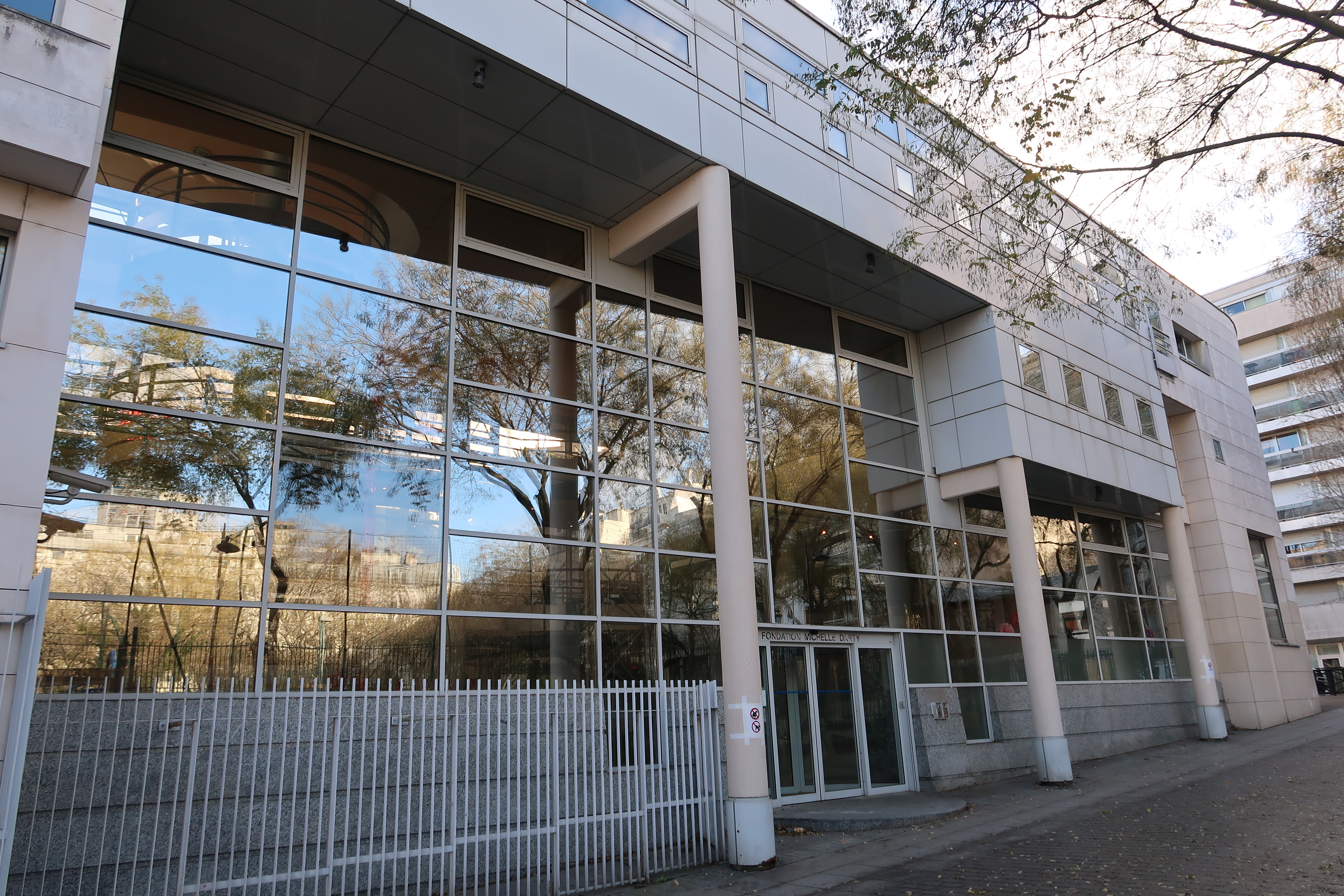 Fondation Michelle-Darty, rue Pierre-Gourdault (Paris, 13).